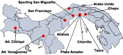 Equipos de la Anaprof 2008+2009